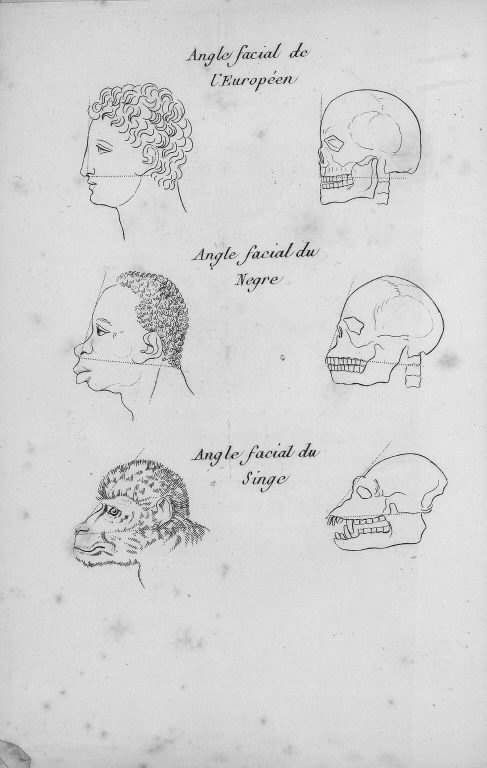 Картинка, показывающая лицевые углы